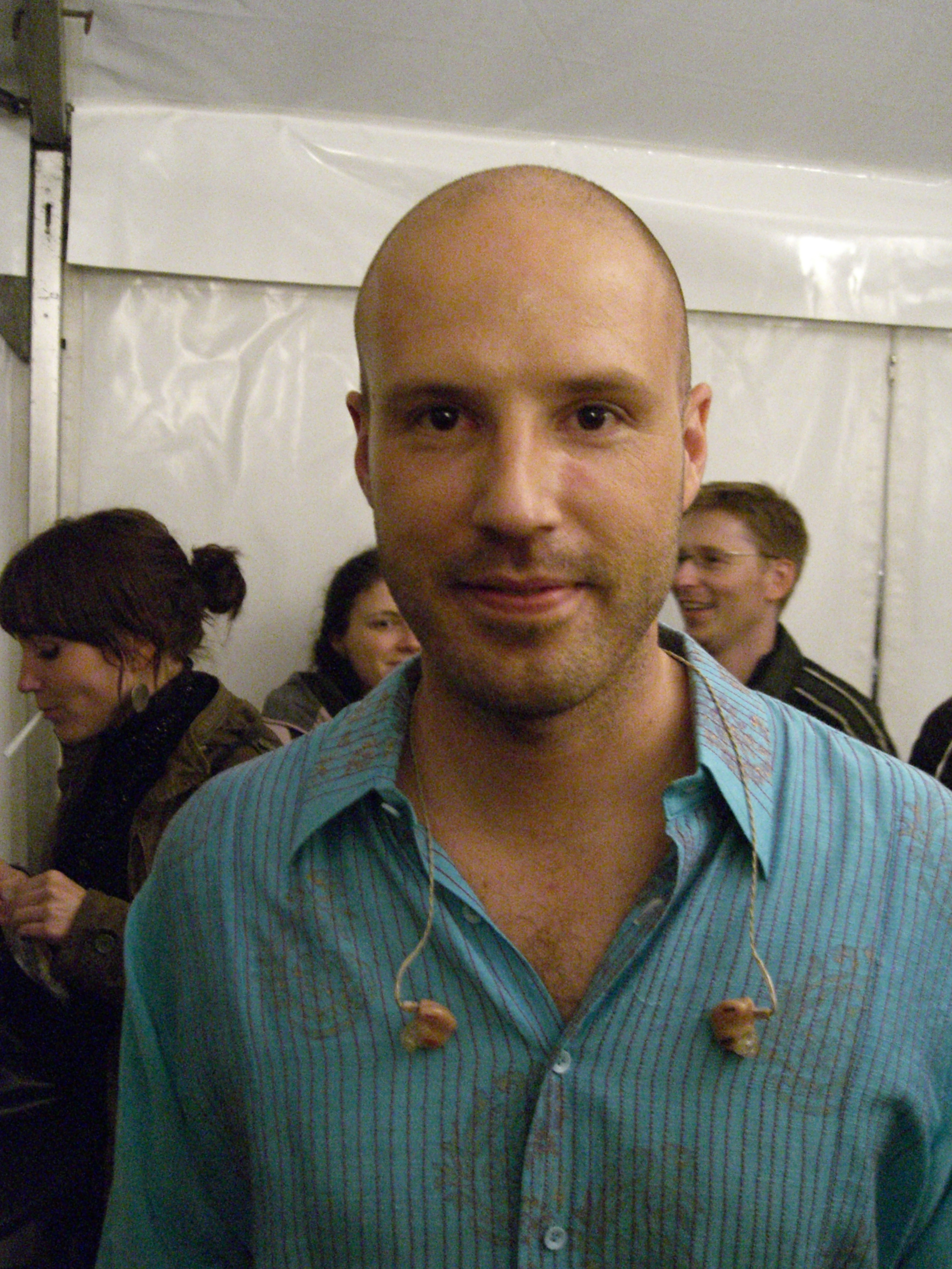 Christopher von Deylen Sonstiges: Aufgenommen beim Konzert in Berlin